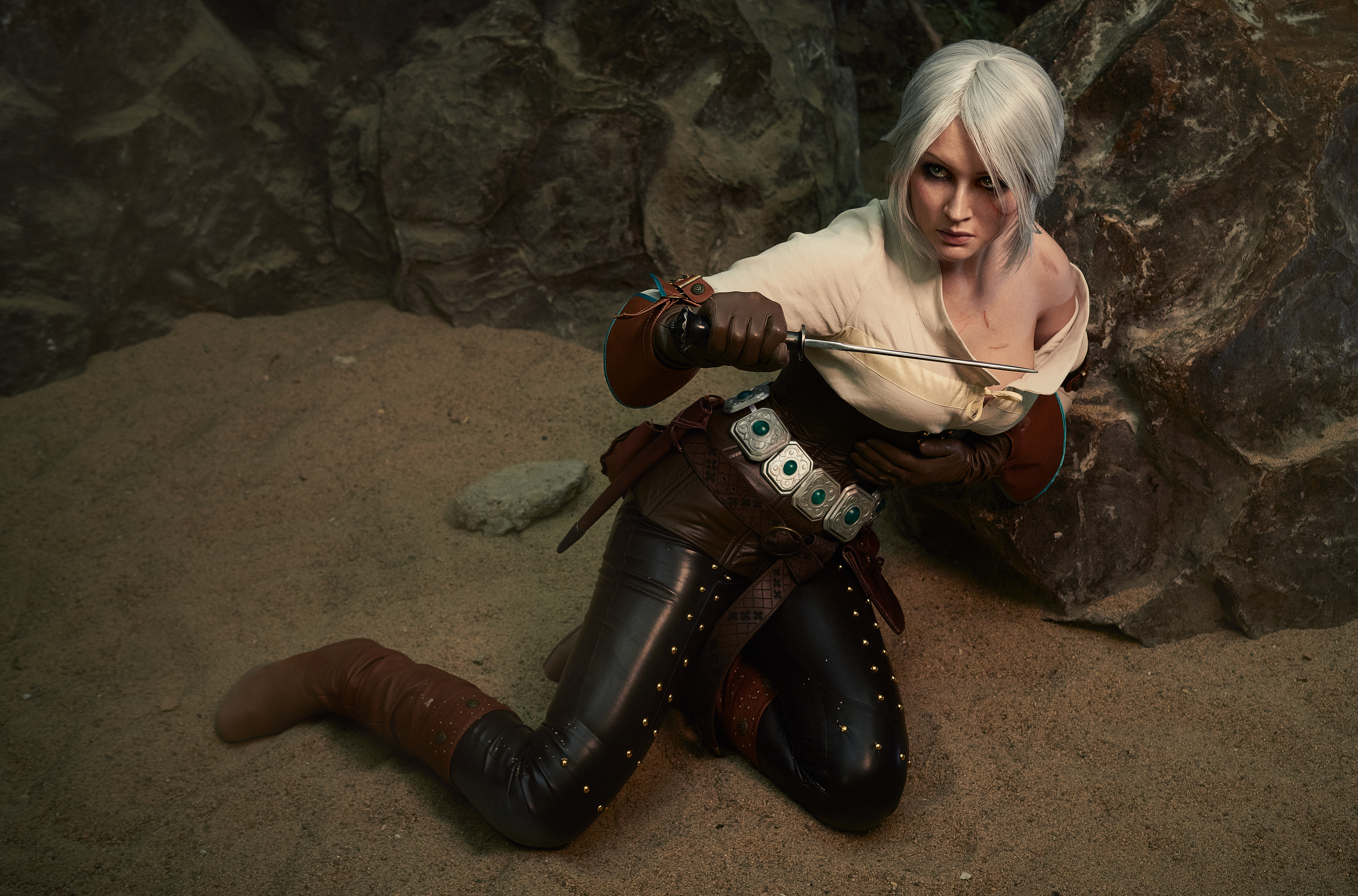 Ciri Cosplay (The Witcher 3 Wild Hunt)